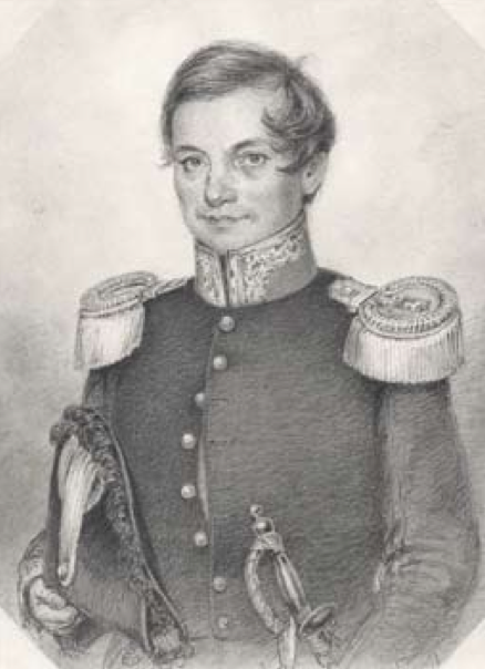 Ferdinand Carl Schmidtmann